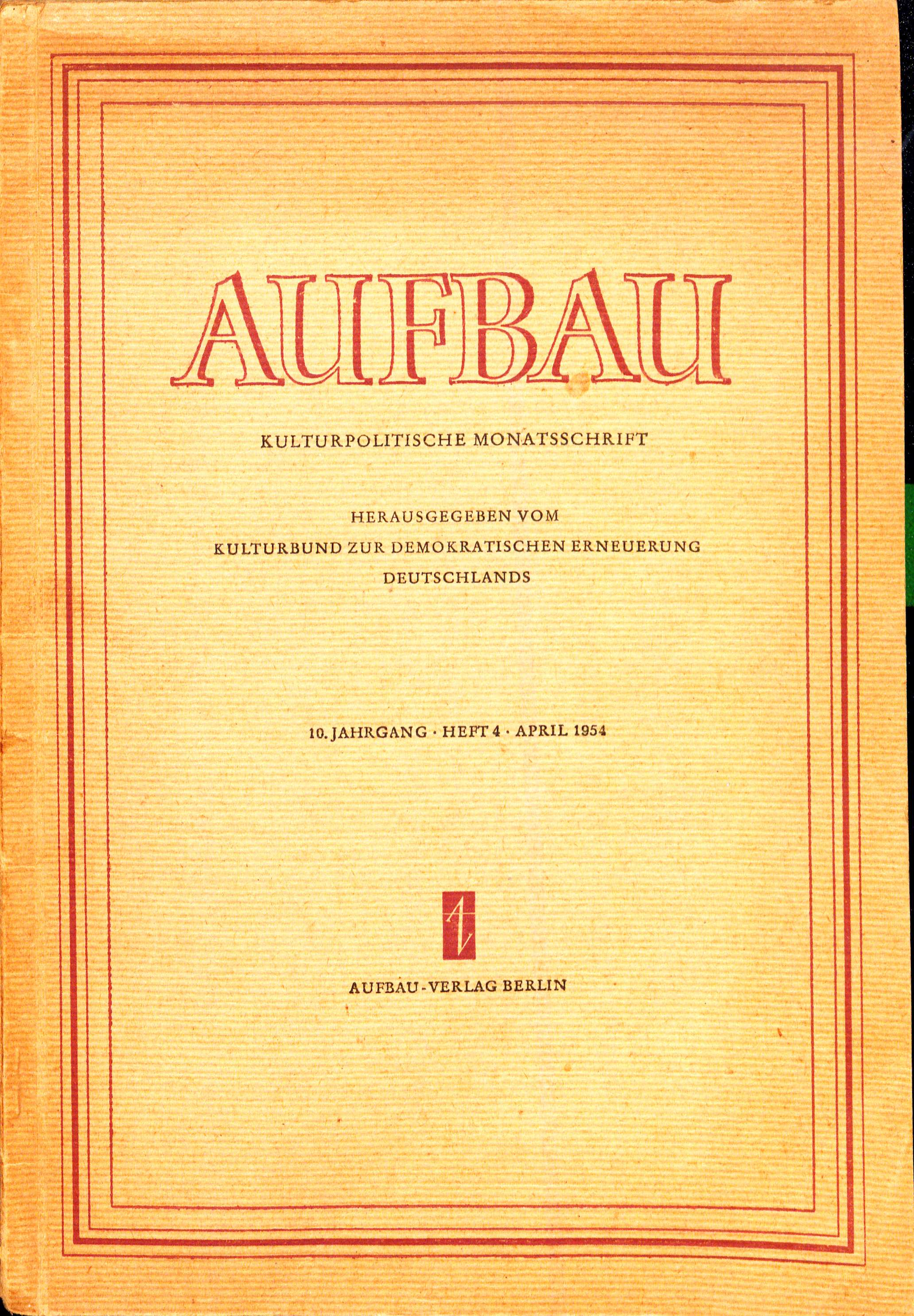 Aufbau (DDR-Zeitschrift) Kulturpolitische Monatsschrift 1954 Titel